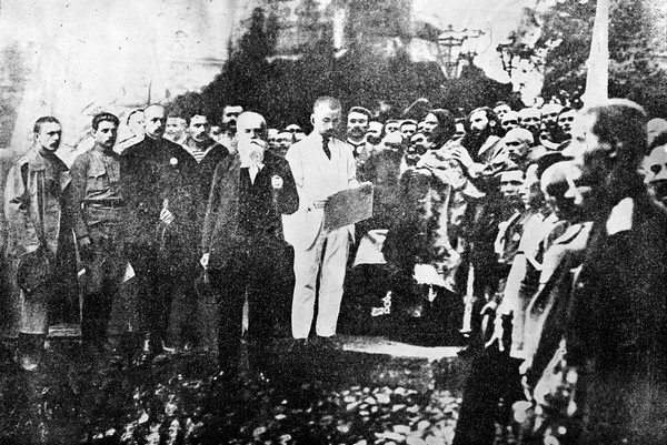 Проголошення Першого Універсалу Української Центральної Ради до народу України після молебню на Софійській площі. Читає М. Ковалевський, ліворуч – голова Української Центральної Ради Михайло Грушевський. Київ, 25 (12) червня 1917 р. ЦДКФФА України ім. Г. С. Пшеничного, од. обл. 2-31003